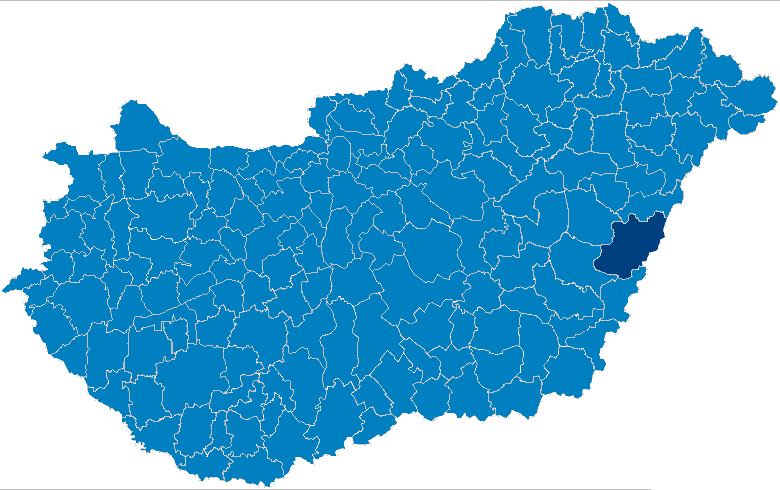 Lages des Kleingebietes Berettyóújfalu in Ungarn